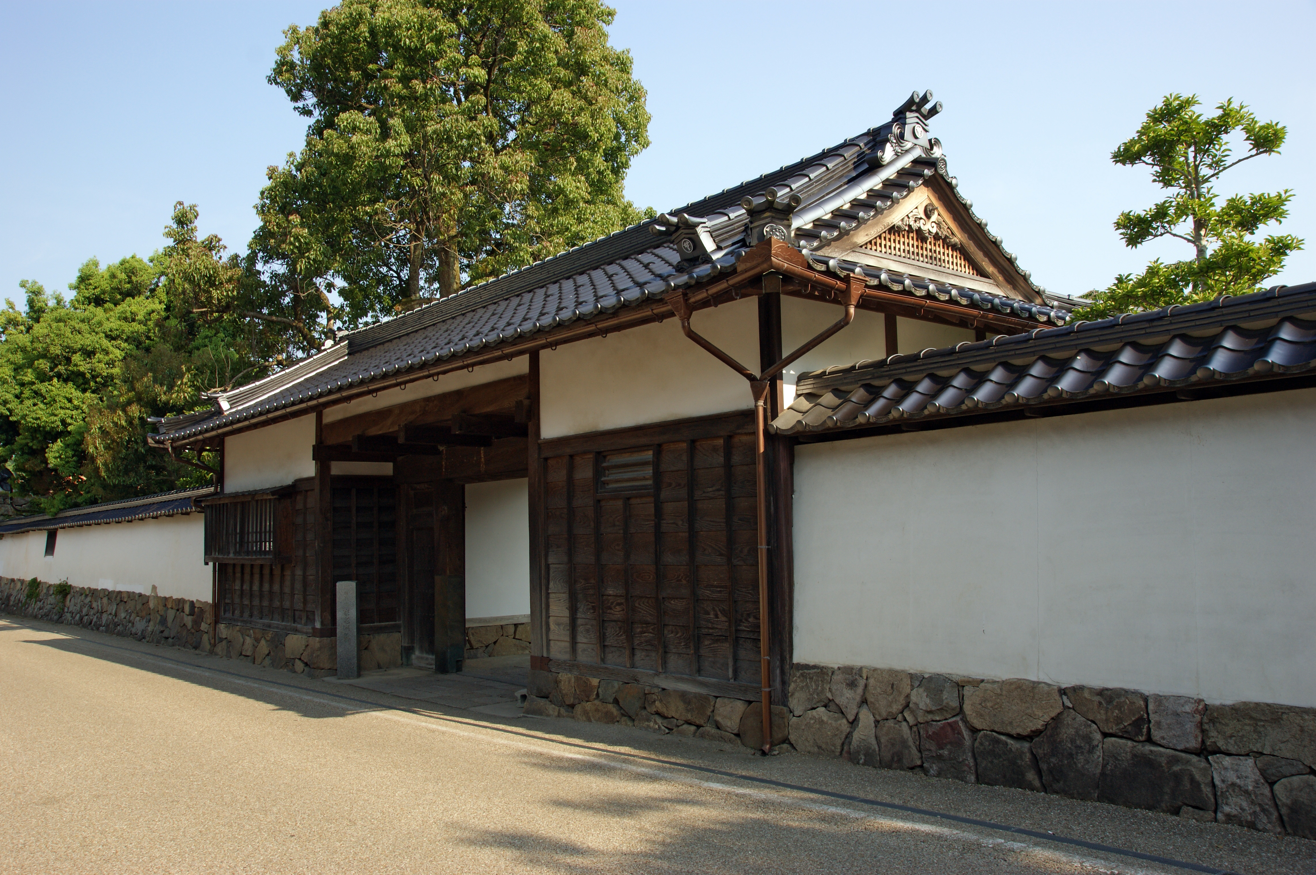 Izushi Karo Yashiki (Sakyo house) in Toyooka, Hyogo prefecture, Japan